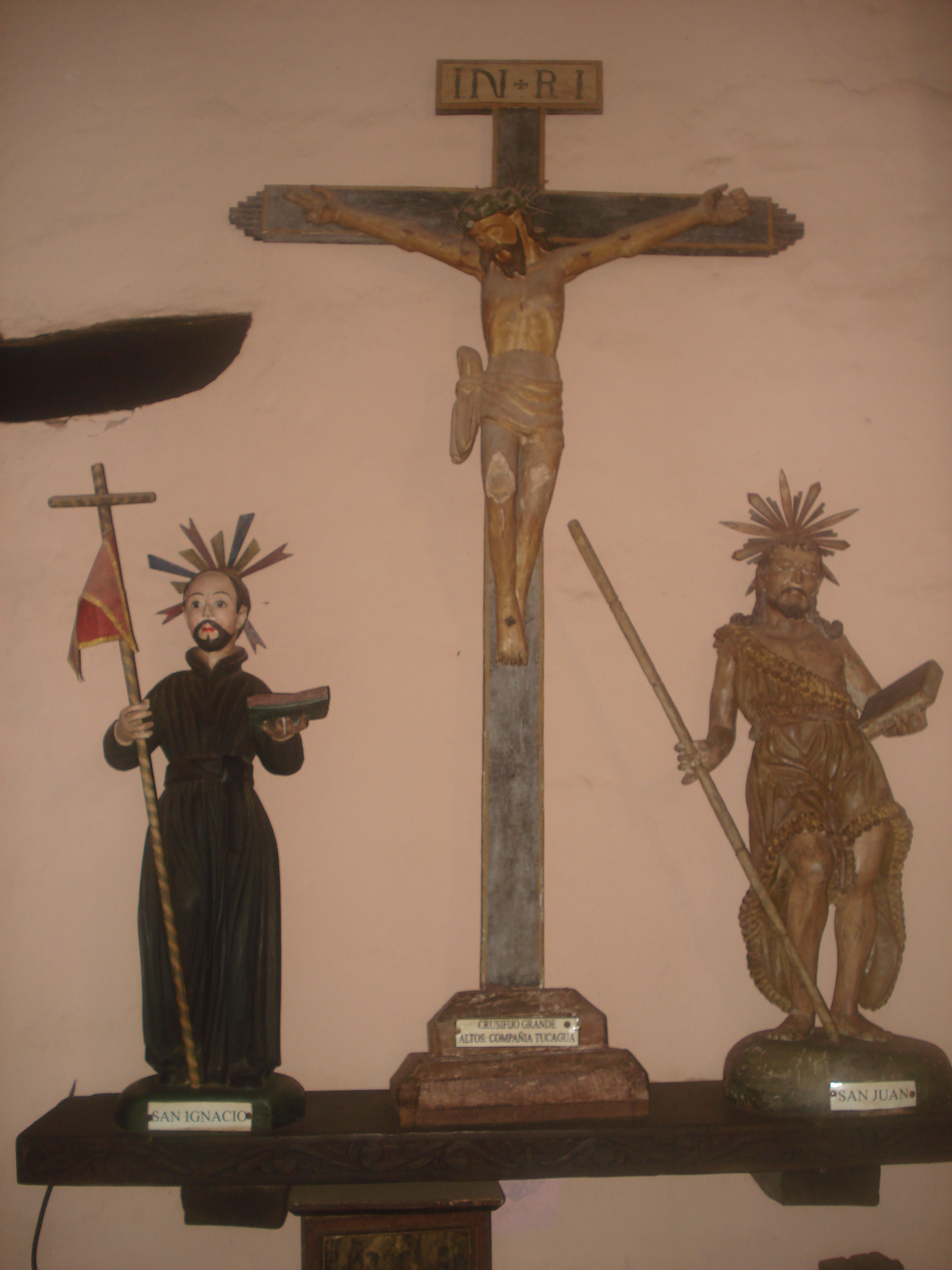 Crucifijo. Epoca Colonial. Paraguay